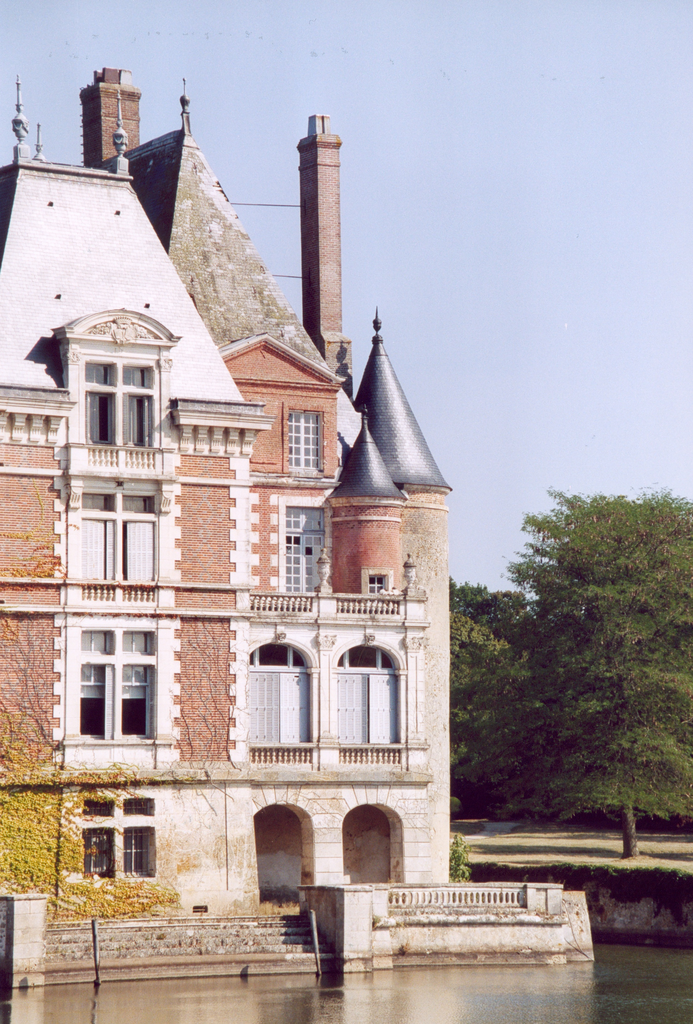 France Loiret La Bussière Le château Photographie prise par GIRAUD Patrick